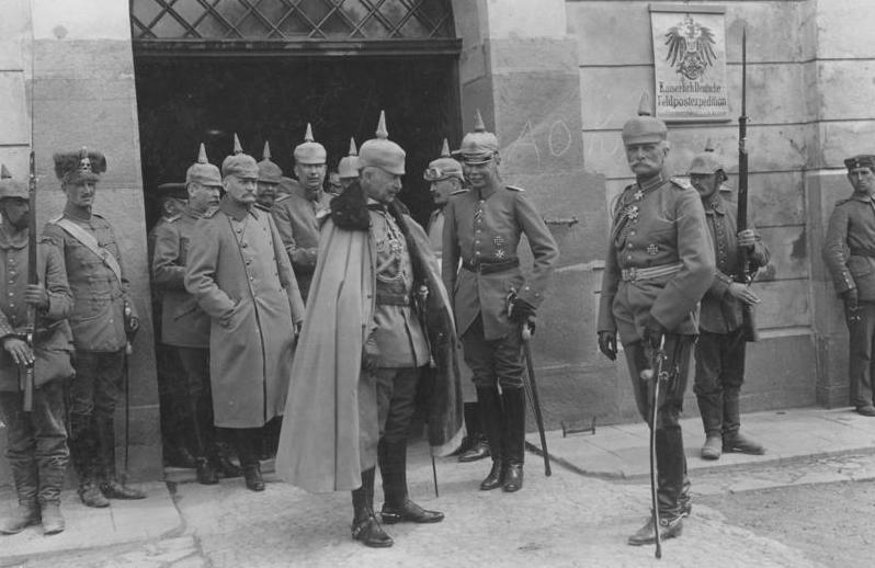 Der Kaiser [Wilhelm II.] und Generalfeldmarschall [August] von Mackensen auf dem südöstlichen Kriegsschauplatz